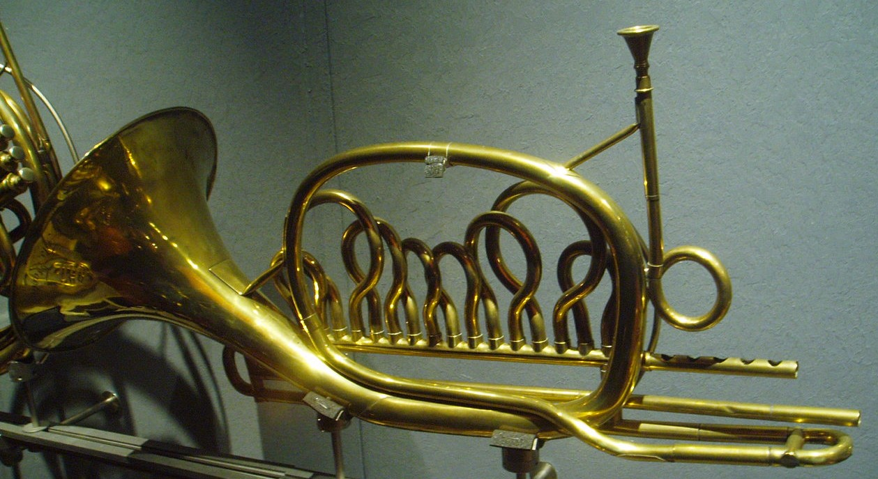 Omnitonic Horn - Jacques Charles Labbaye, Paris, circa 1820 - Paris, Musée de la musique